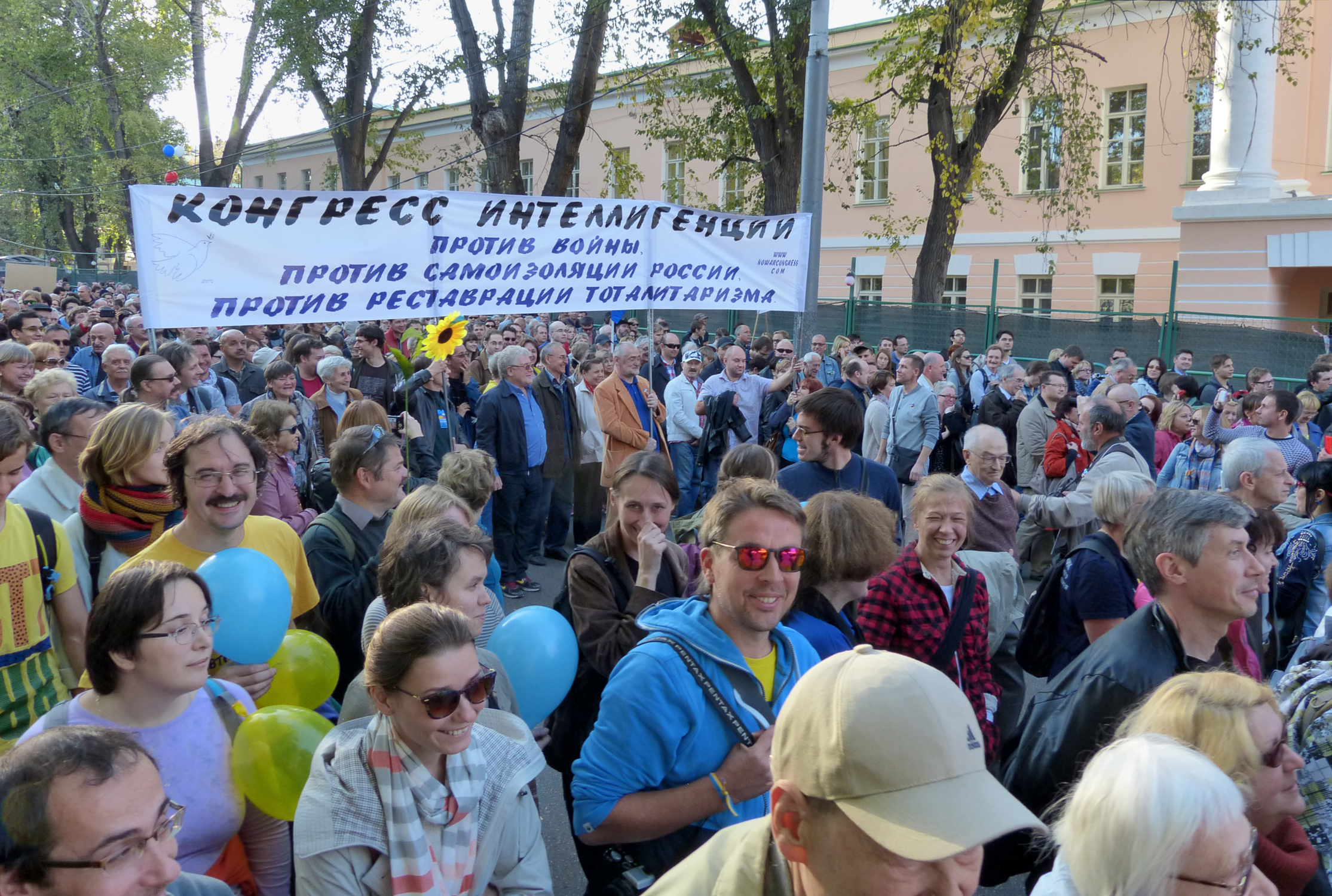 Общероссийский марш мира против вторжения солдат путинского режима на Украину. Москва, Бульварное кольцо, Страстной бульвар, 21 сентября 2014 года. Надпись в руках у демонстрантов: «Конгресс интеллигенции против войны, против самоизоляции России, против реставрации тоталитаризма».